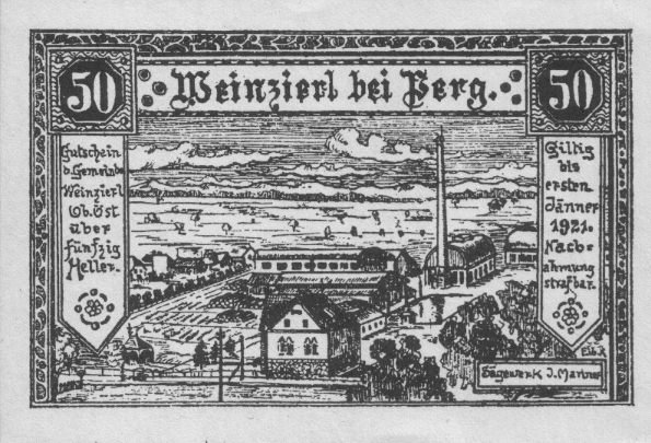 Die Mannersäge abgebildet auf einem Notgeldschein der Gemeinde Weinzierl bei Perg